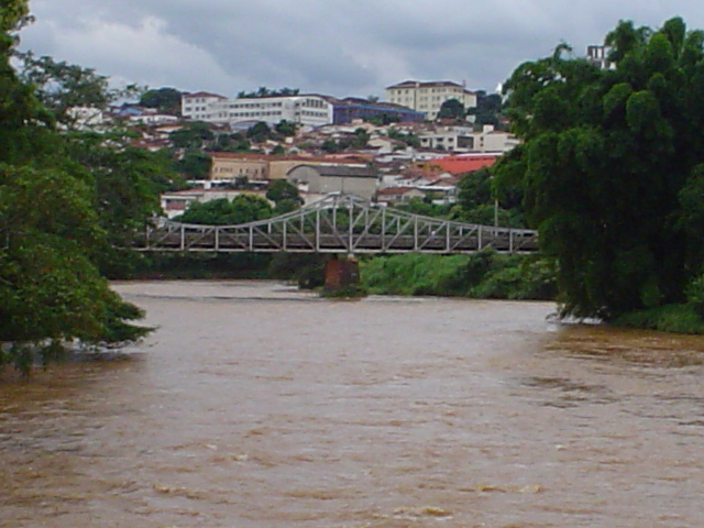 Ponte Euclides da Cunha, em São José do Rio Pardo, SP, Brasil.